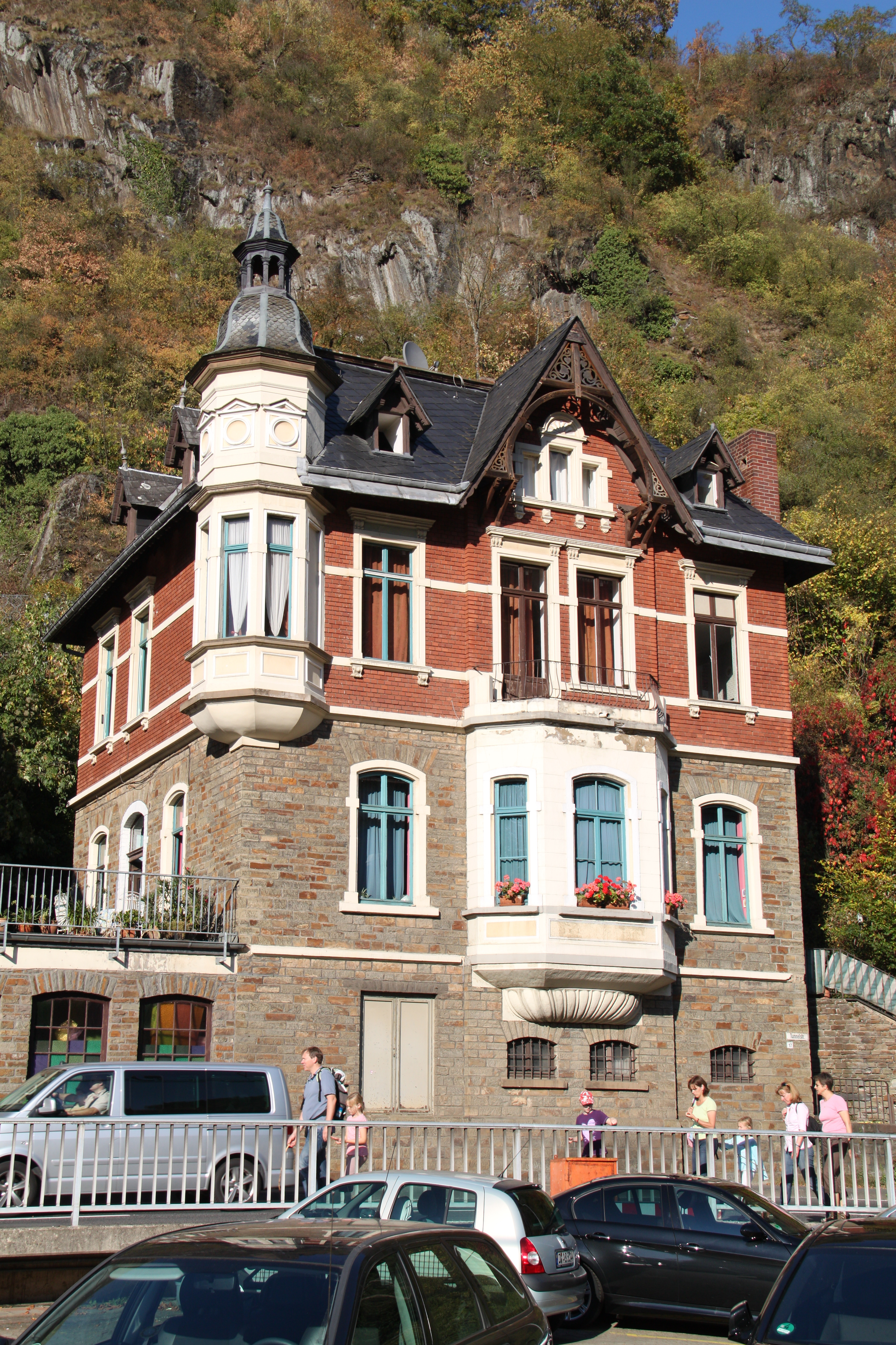 Altenahr, Tunnelstraße 17, fotografiert vom Parkplatz gegenüber, es ist Sonntag nachmittag, viele Touristen sind unterwegs